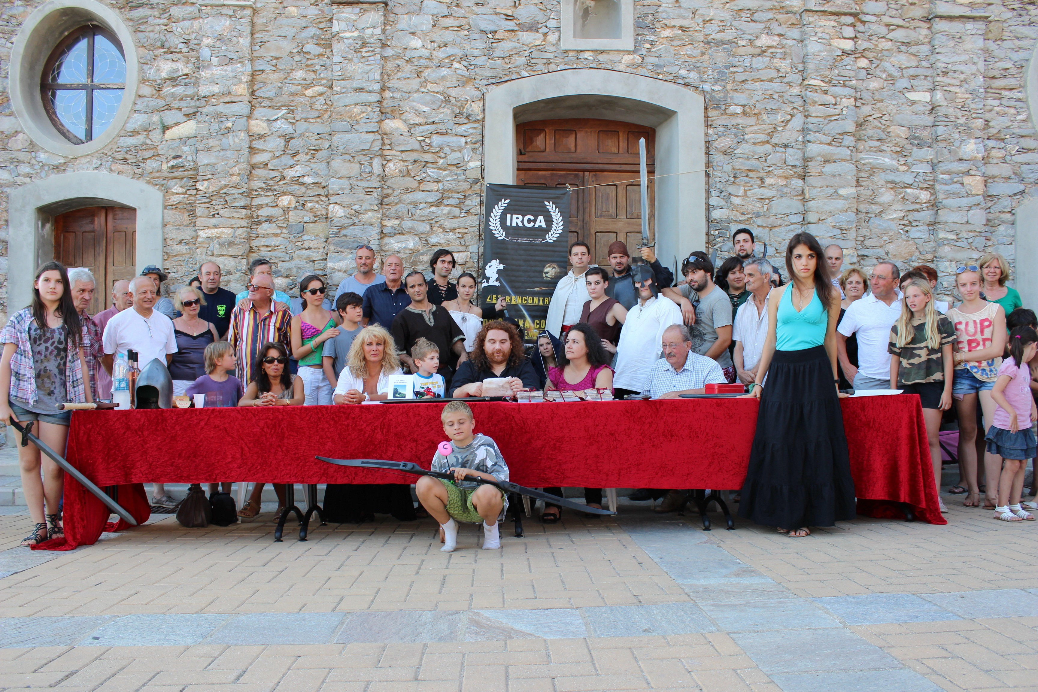 Signature de la CHARTE CINE CORSICA lors des 20 ans de l'Institut Régional du Cinéma et de l'Audiovisuel (IRCA)